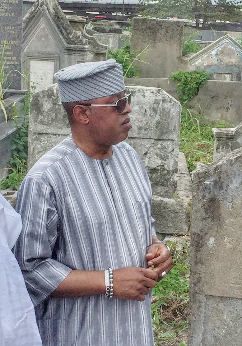 Gbenga Ashafa at Rafiu Tinubu funeral, 2019